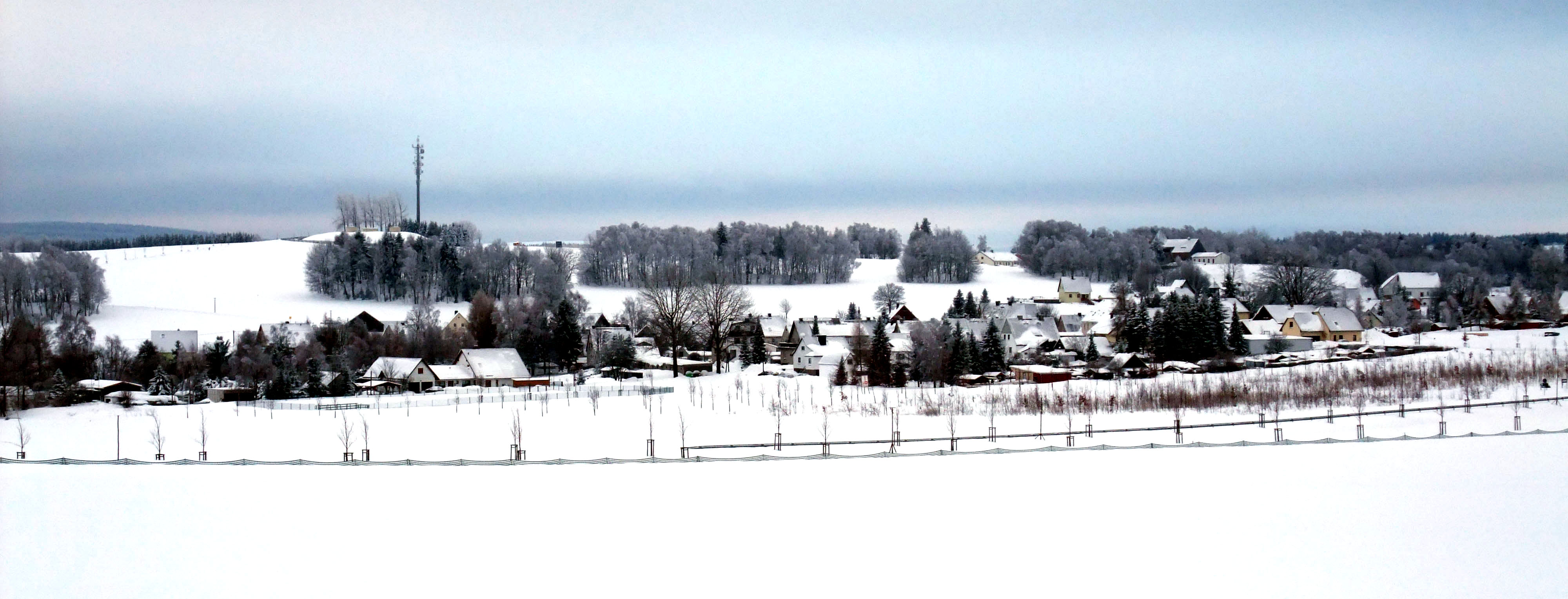 Der Marienberger Ortsteil Lauta von Norden aus Richtung Lauterbach gesehen.